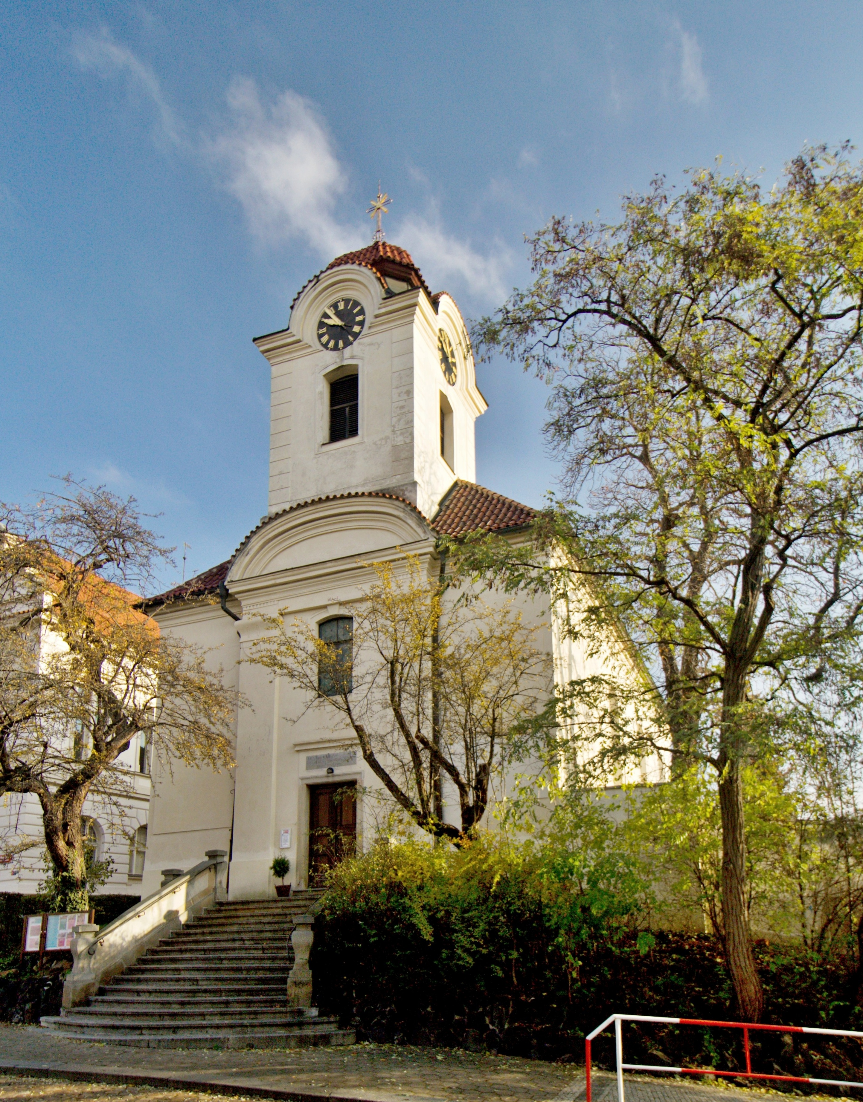 Praha 6-Bubeneč kostel sv. Gottharda